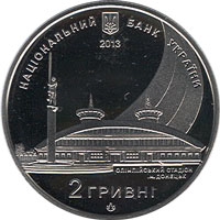 Юнацький чемпіонат світу з легкої атлетики аверс